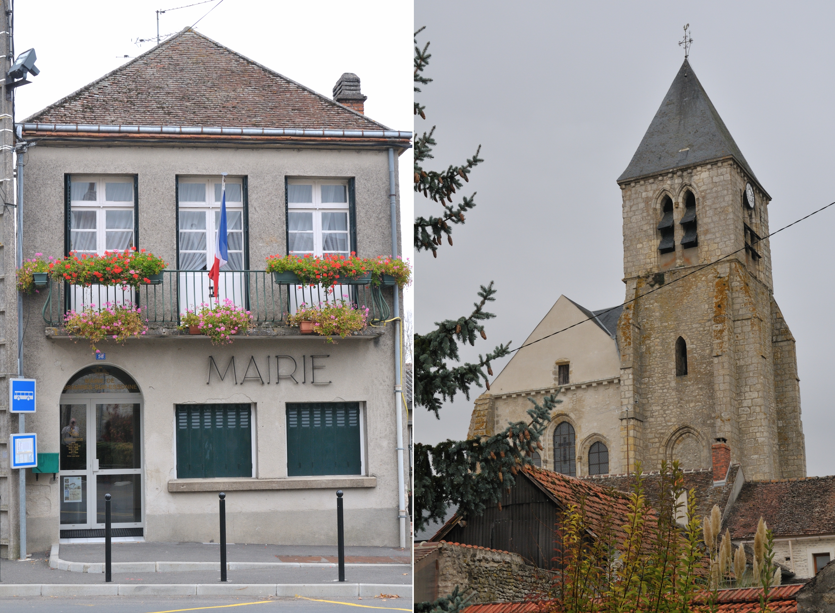 Assemblage de deux photos (mairie et église Saint-Étienne) de Briarres-sur-Essonne, Loiret, France